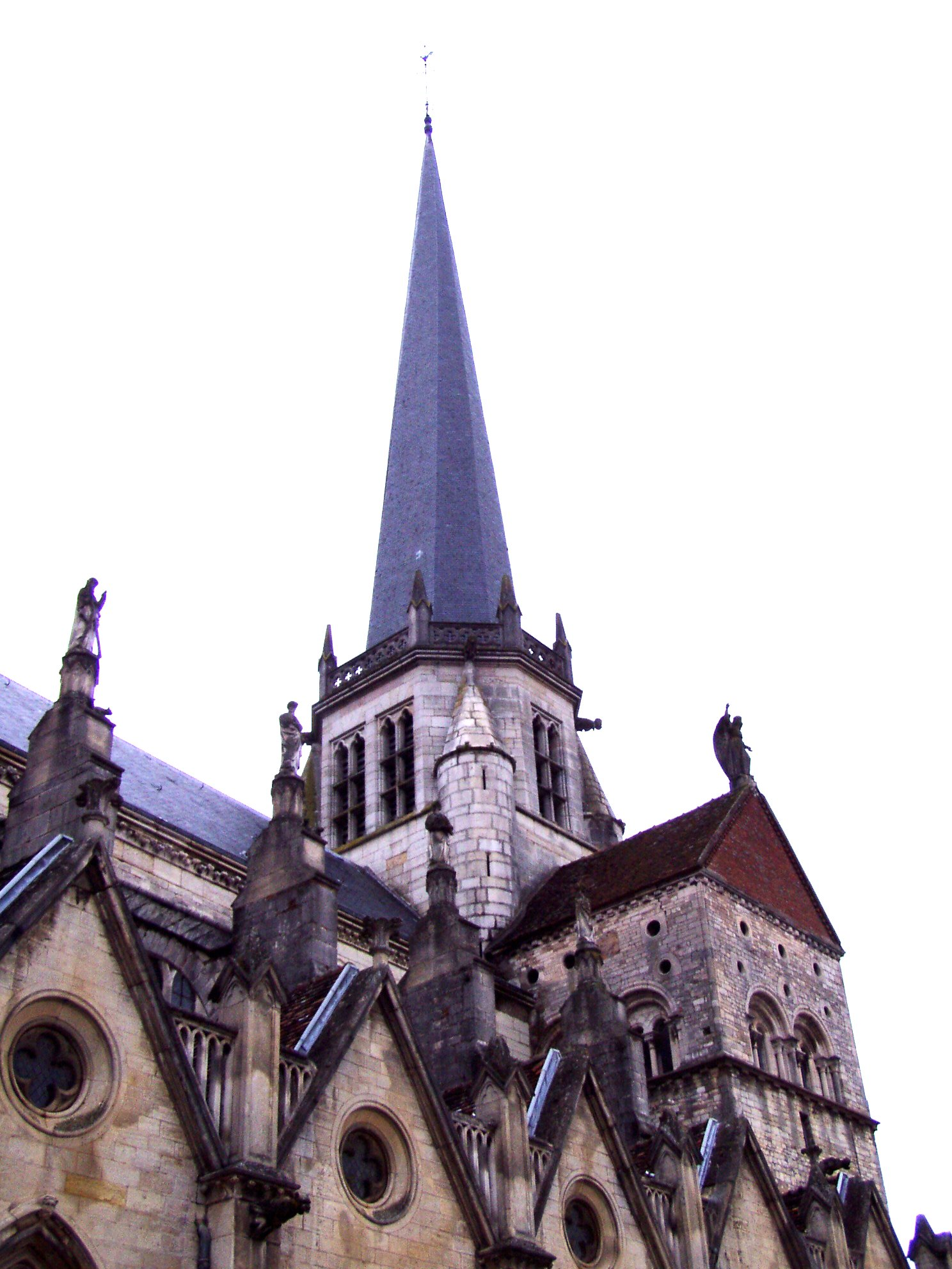 clocher de l'église d'Auxonne en Côte-d'Or